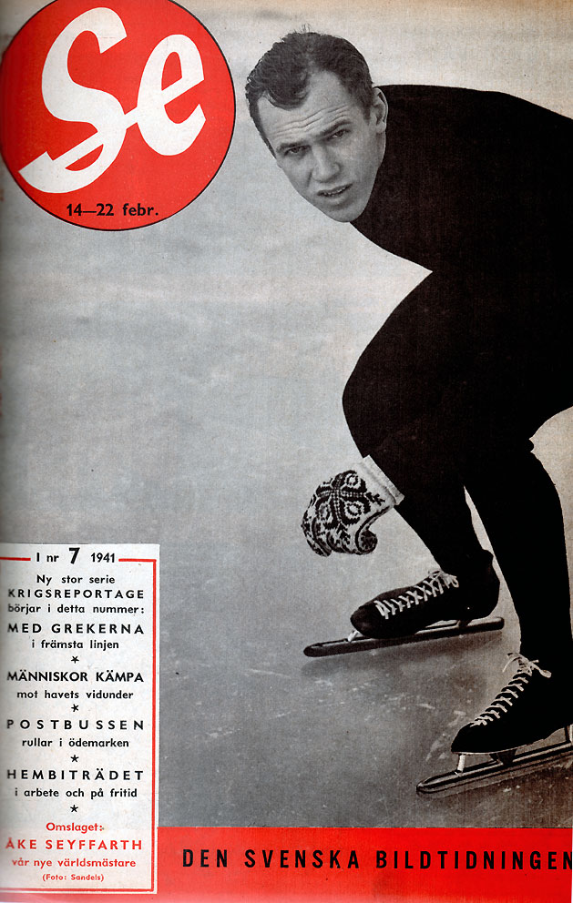 Åke Seyffarth